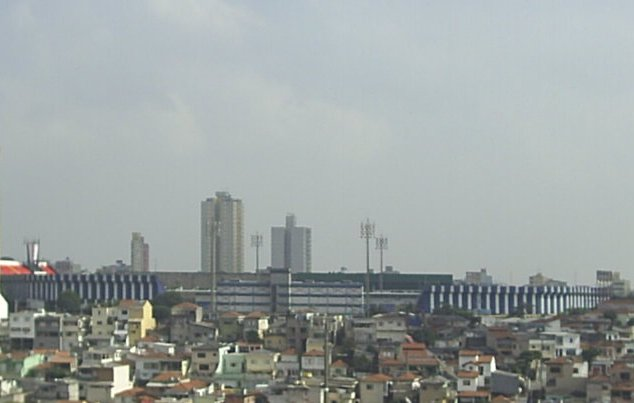 Estádio de futebol de São Caetano do Sul.